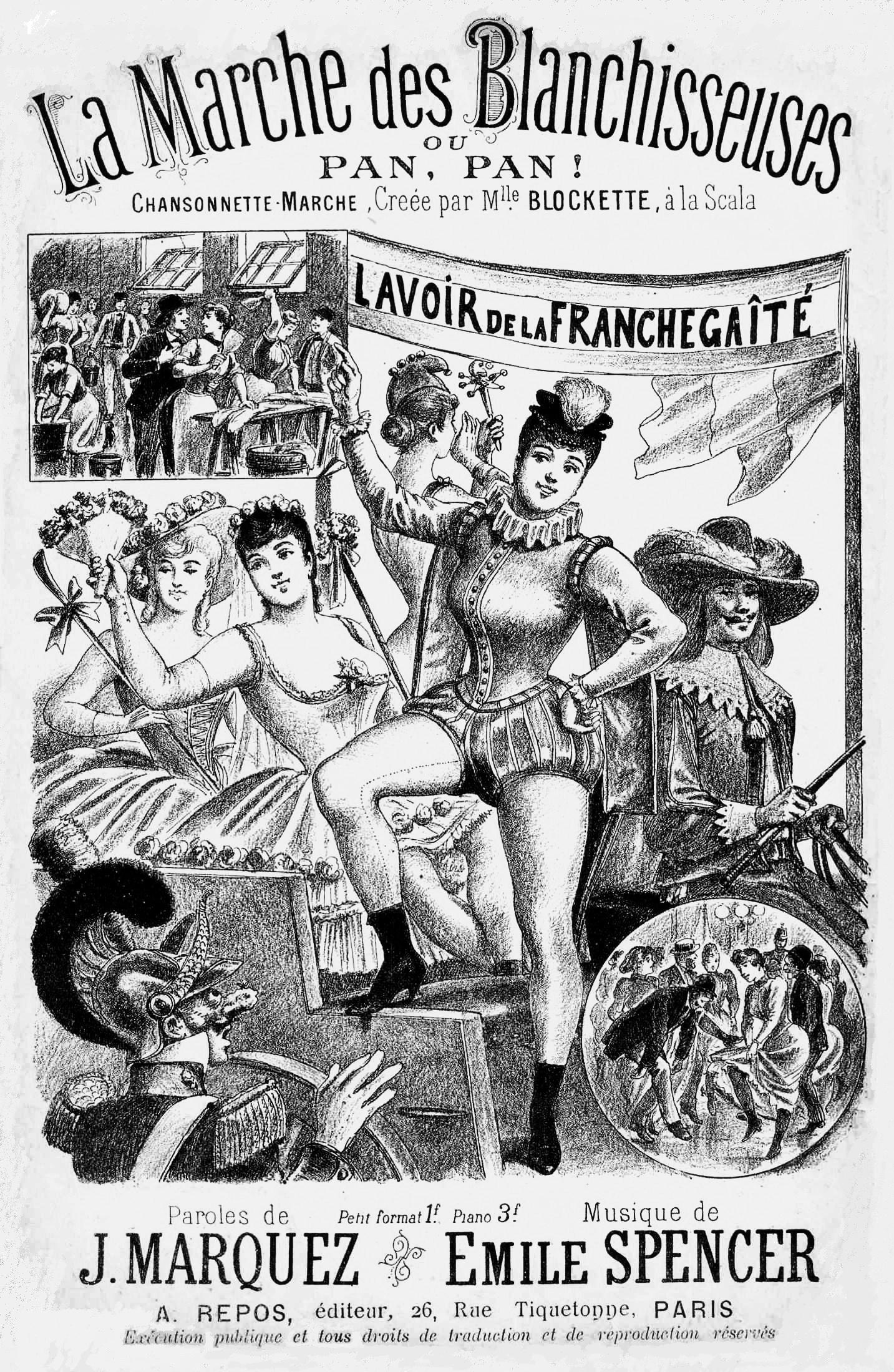 Partition de musique avec dessin figurant les blanchisseuses parisiennes en fête pour la Mi-Carême.